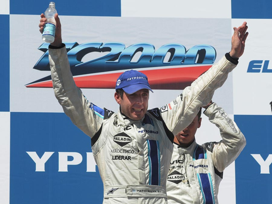 La siguiente es una fotografía del piloto de automovilismo argentino Juan Manuel Silva. La misma fue tomada por Cano, fotografo de Argentina y publicada en su sitio web: LA misma fué solicitada para su publicación en Wikipedia como lo exigen las leyes de Copyright.